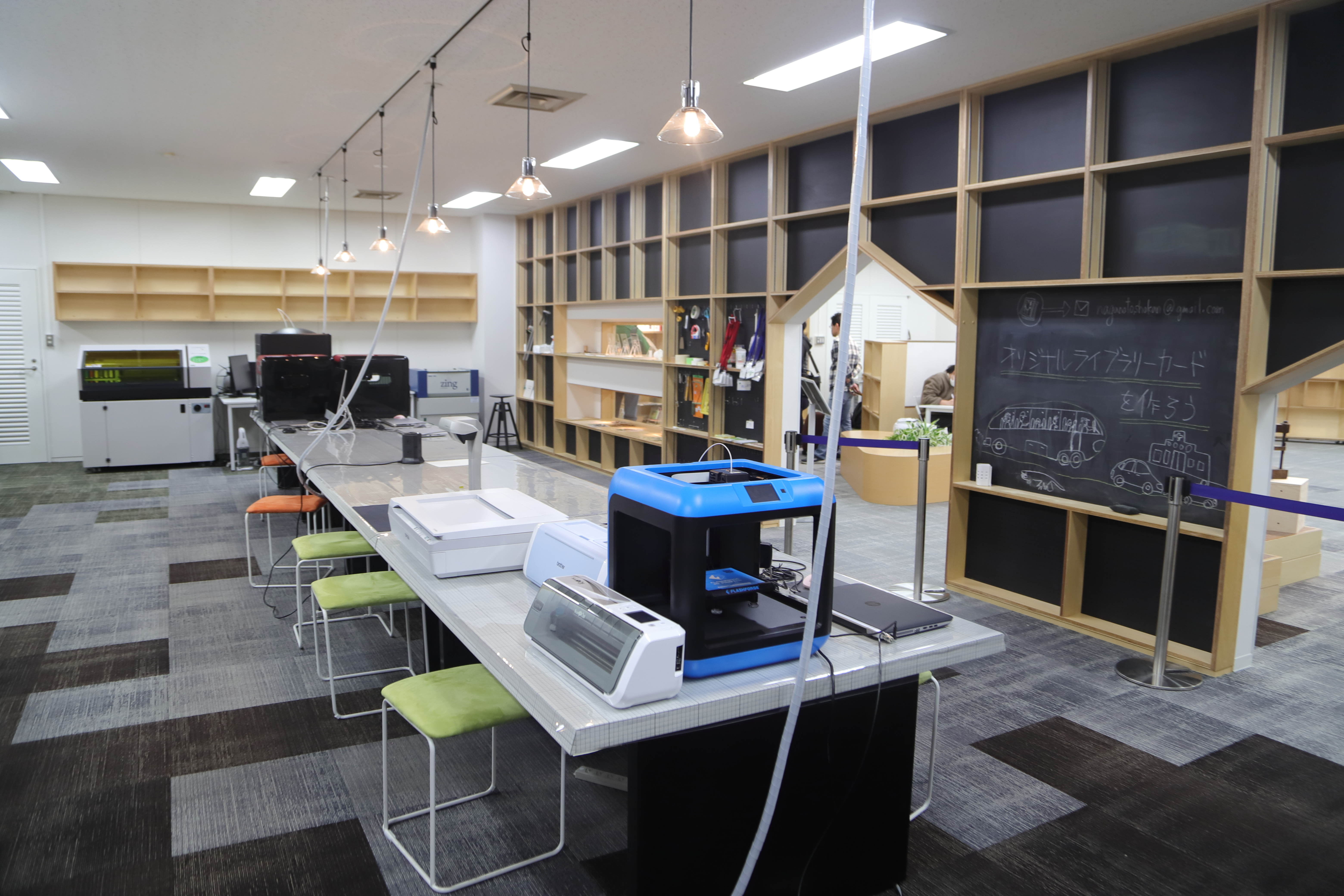 県立長野図書館「信州・学び創造ラボ」